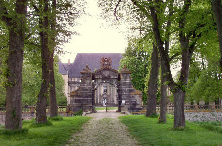 Le Château d'Effiat (Puy de Dôme, France)